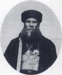 Thomas Audo chaldäisch-katholischer Bischof von Urmia